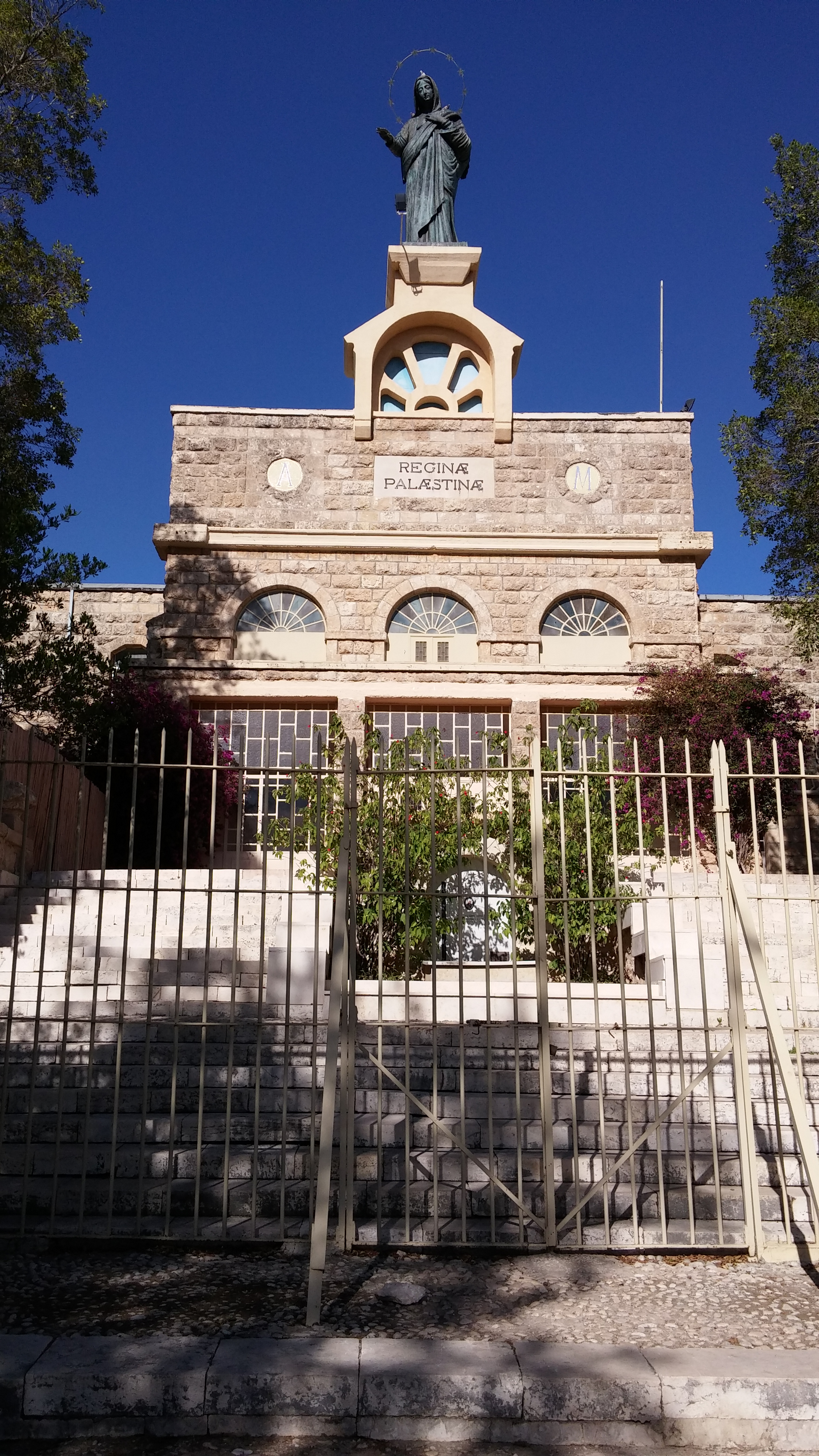 מנזר דיר ראפאת 05